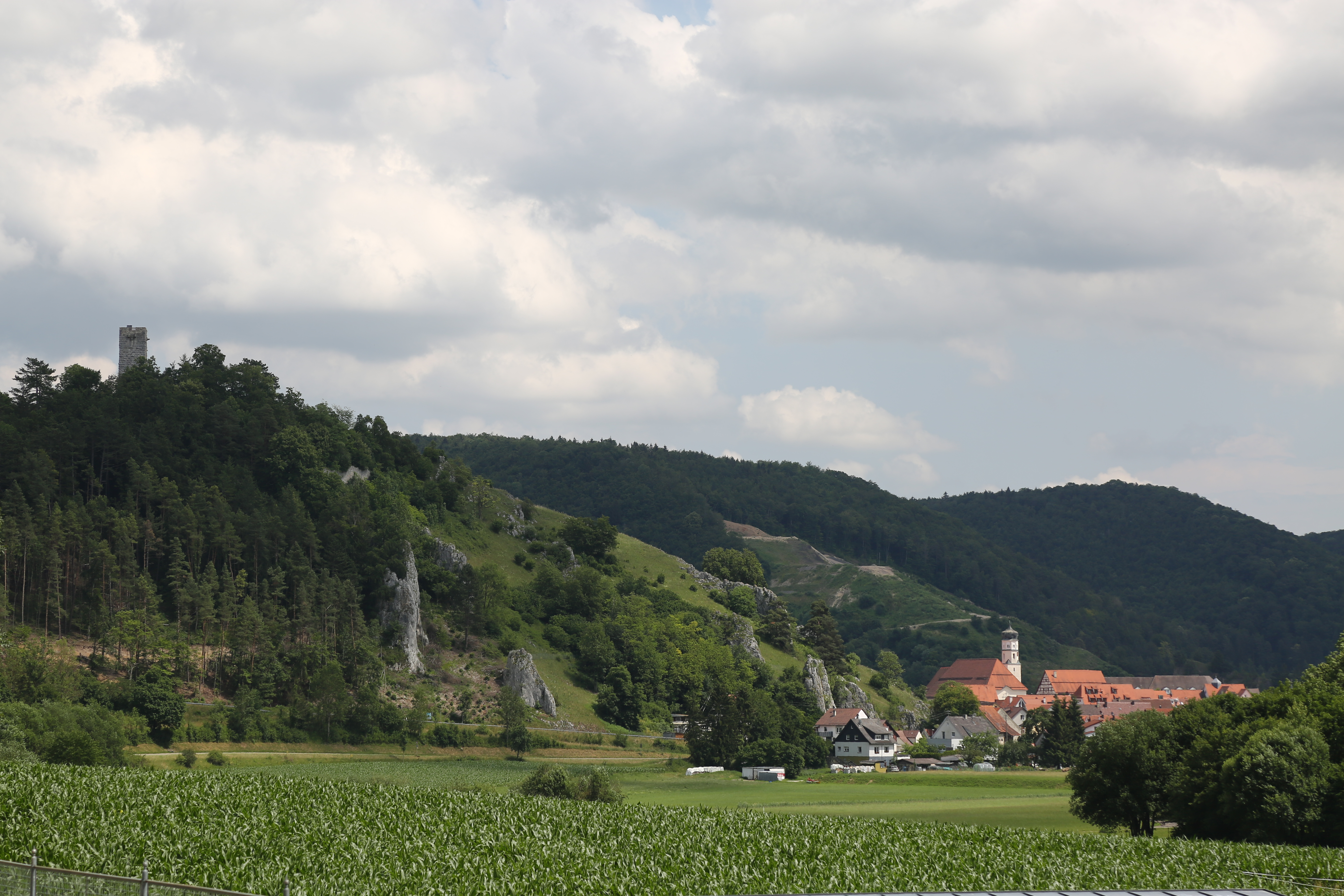 Schelklingen, Alb-Donau-Kreis. Der Ort liegt unterhalb des Turms der Burg Hohenschelklingen